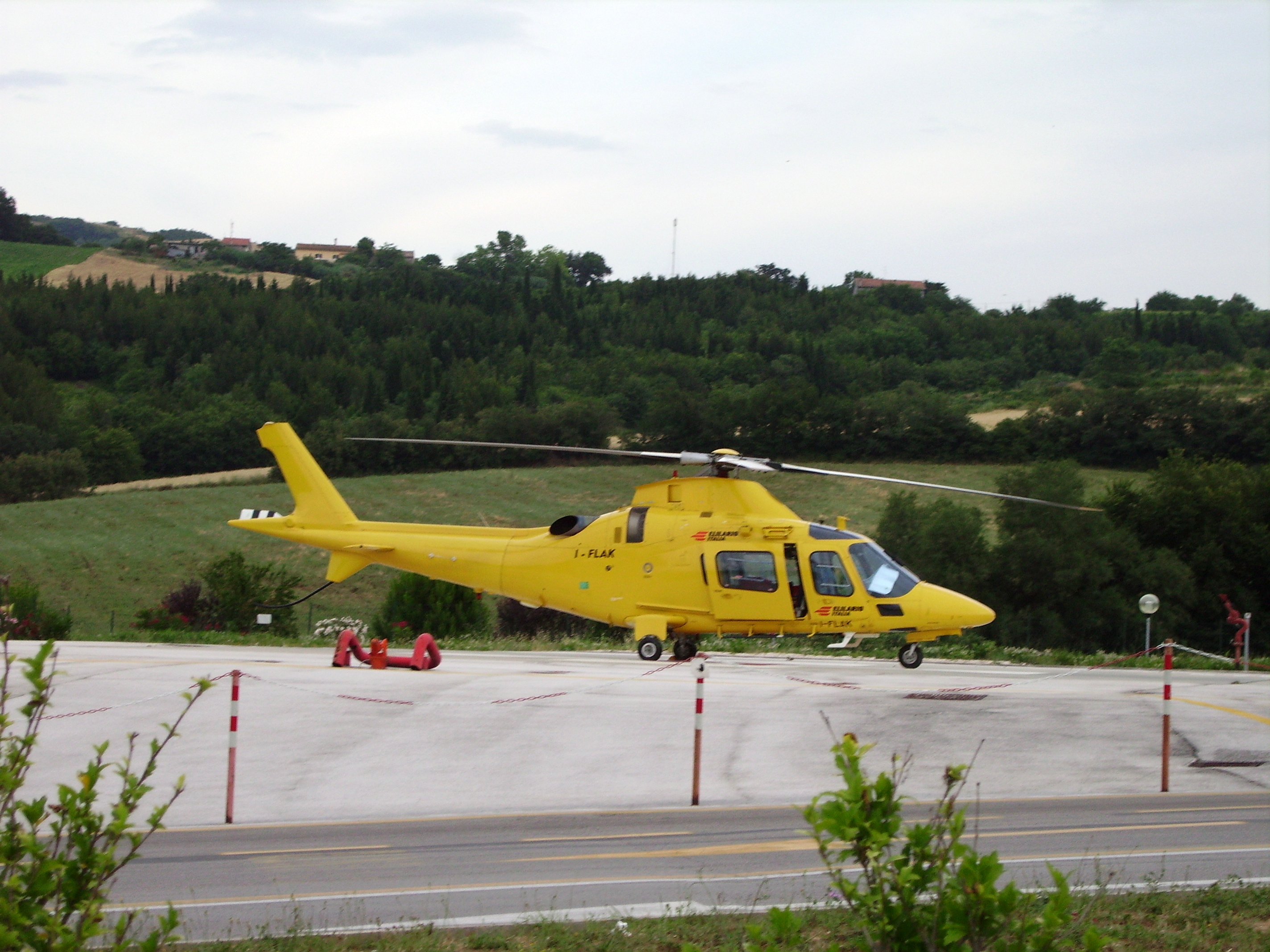 Elicottero adibito ad elisoccorso presso l'ospedale di Torrette di Ancona. Comunemente chiamato Icaro.